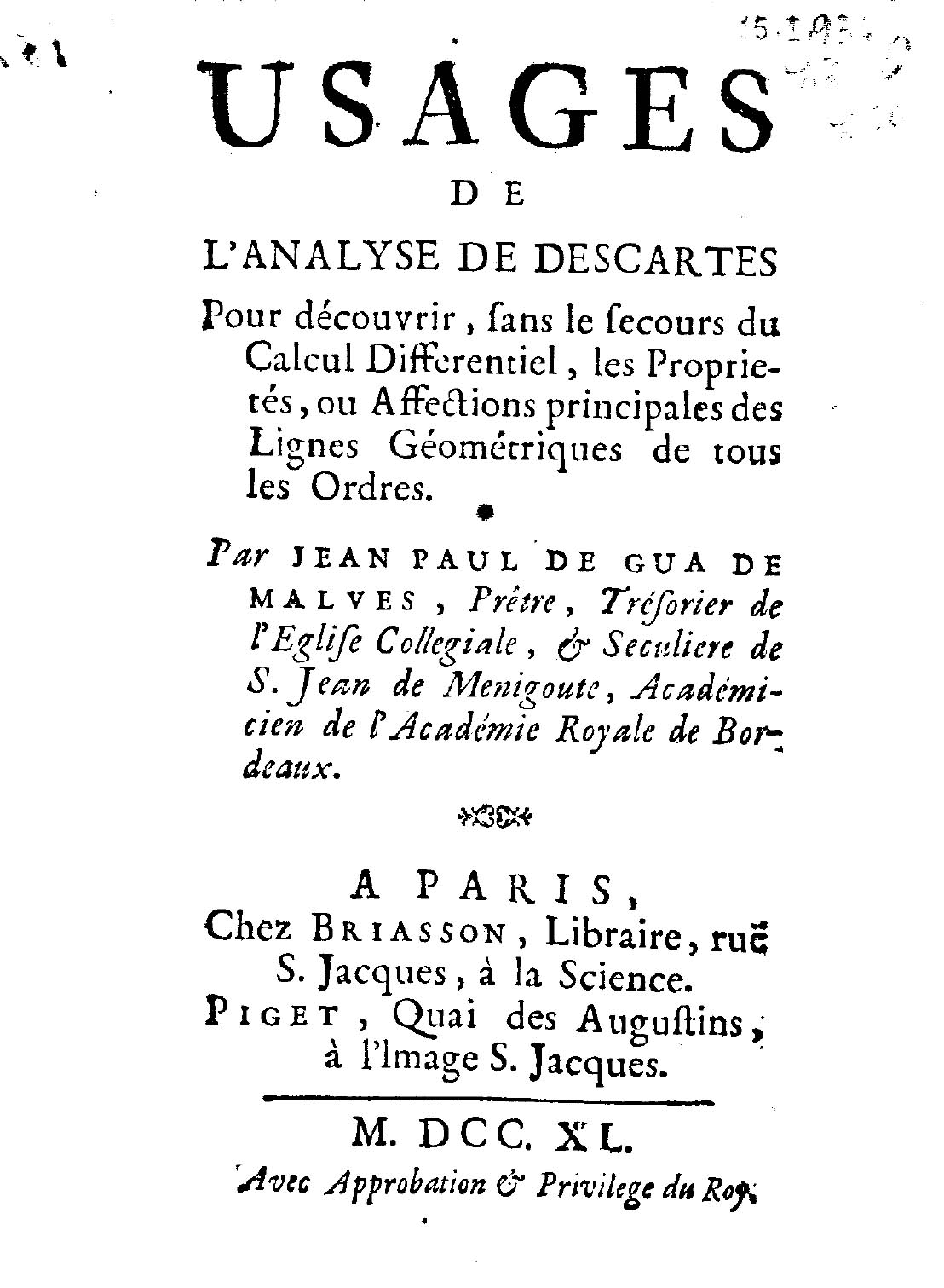 Usages de l'analyse de Descartes pour découvrir, sans le secours du calcul differentiel, les proprietés, ou affections principales des lignes géométriques de tous les ordres. Par Jean Paul de Gua de Malves .... - A Paris : chez Briasson, Libraire, rue S. Jacques, à la Science: Piget, quai des Augustins, à l'image S. Jacques, 1740 ([Parigi] : de l'imprimerie de Joseph Bullot, rue des Pretres S. Severin, 1740). - XXVI, 457, [3] p., 4 c. di tav. fuori testo ; 12º .